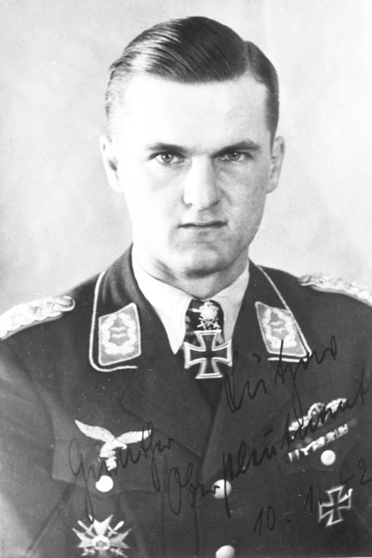 [Foto mit Unterschrift:] Günther Lützow, Oberstleutnant, 10.1.42